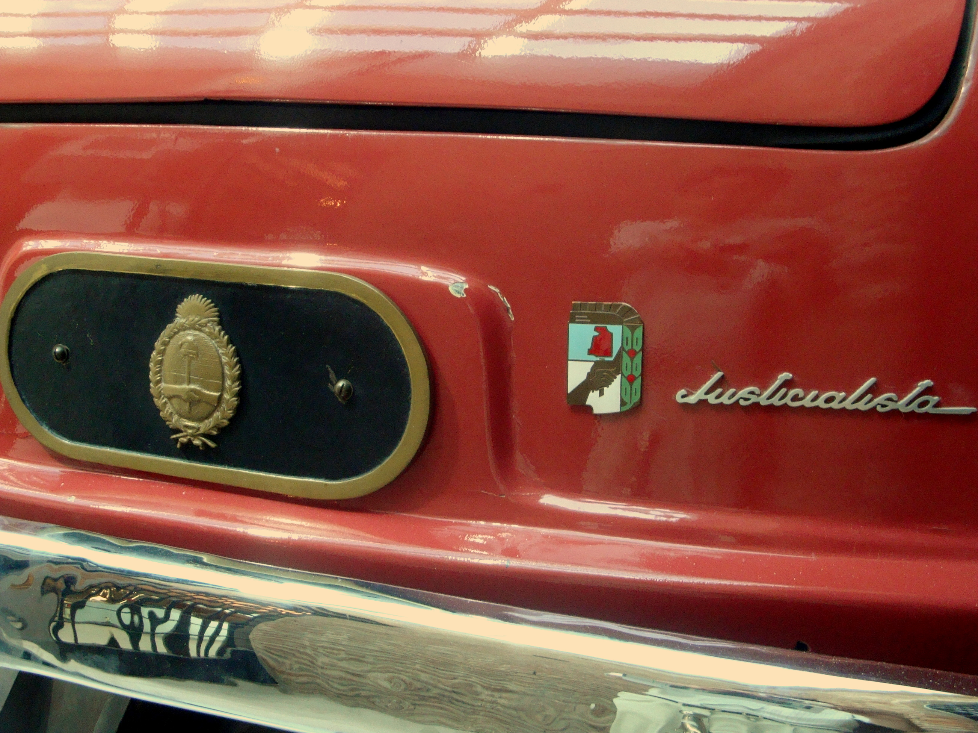 Detalle trasero del ejemplar del automóvil Justicialista Grand Sport, con el escudo partidario y la leyenda "Justicialista".